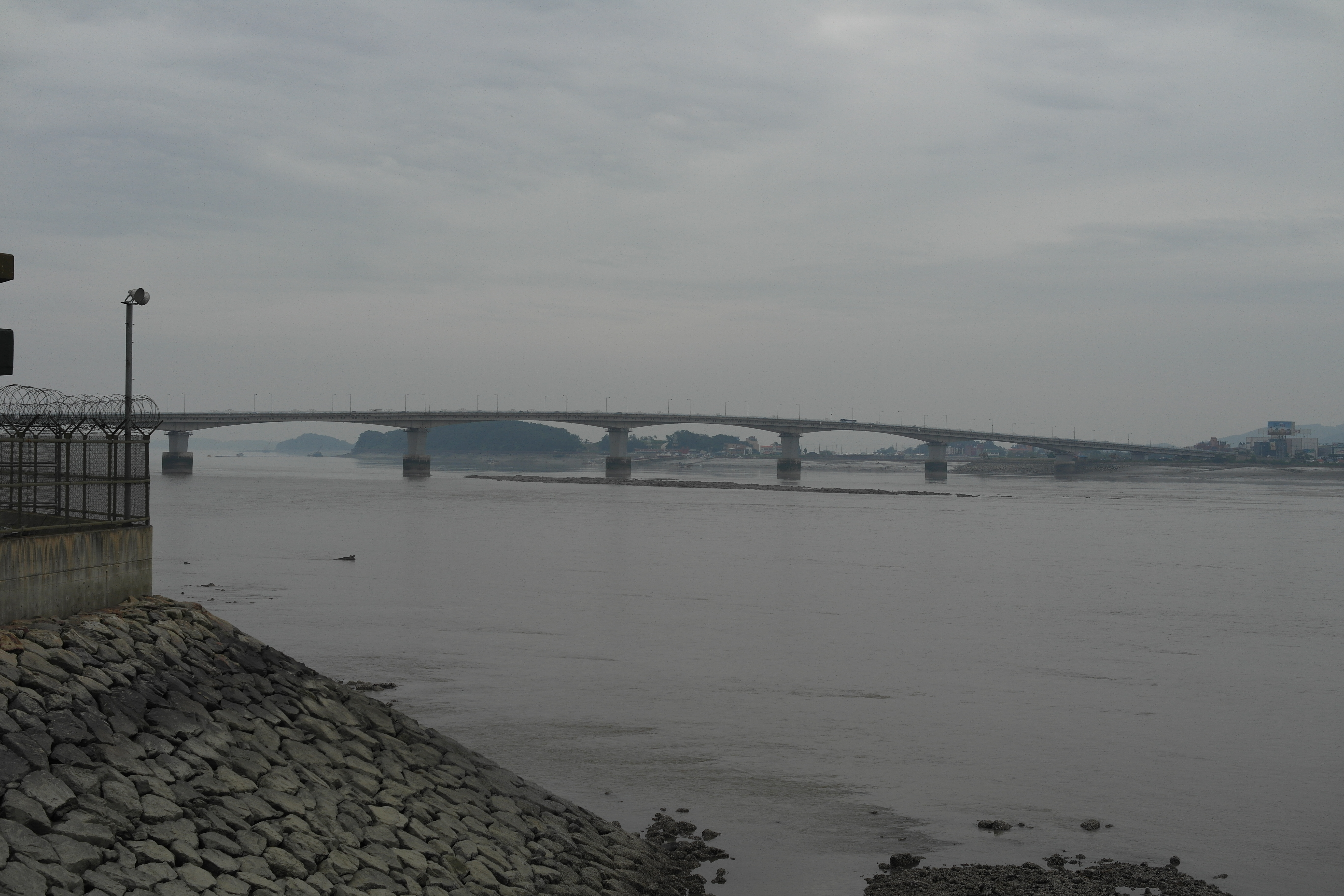 김포함상공원에서 바라본 초지대교